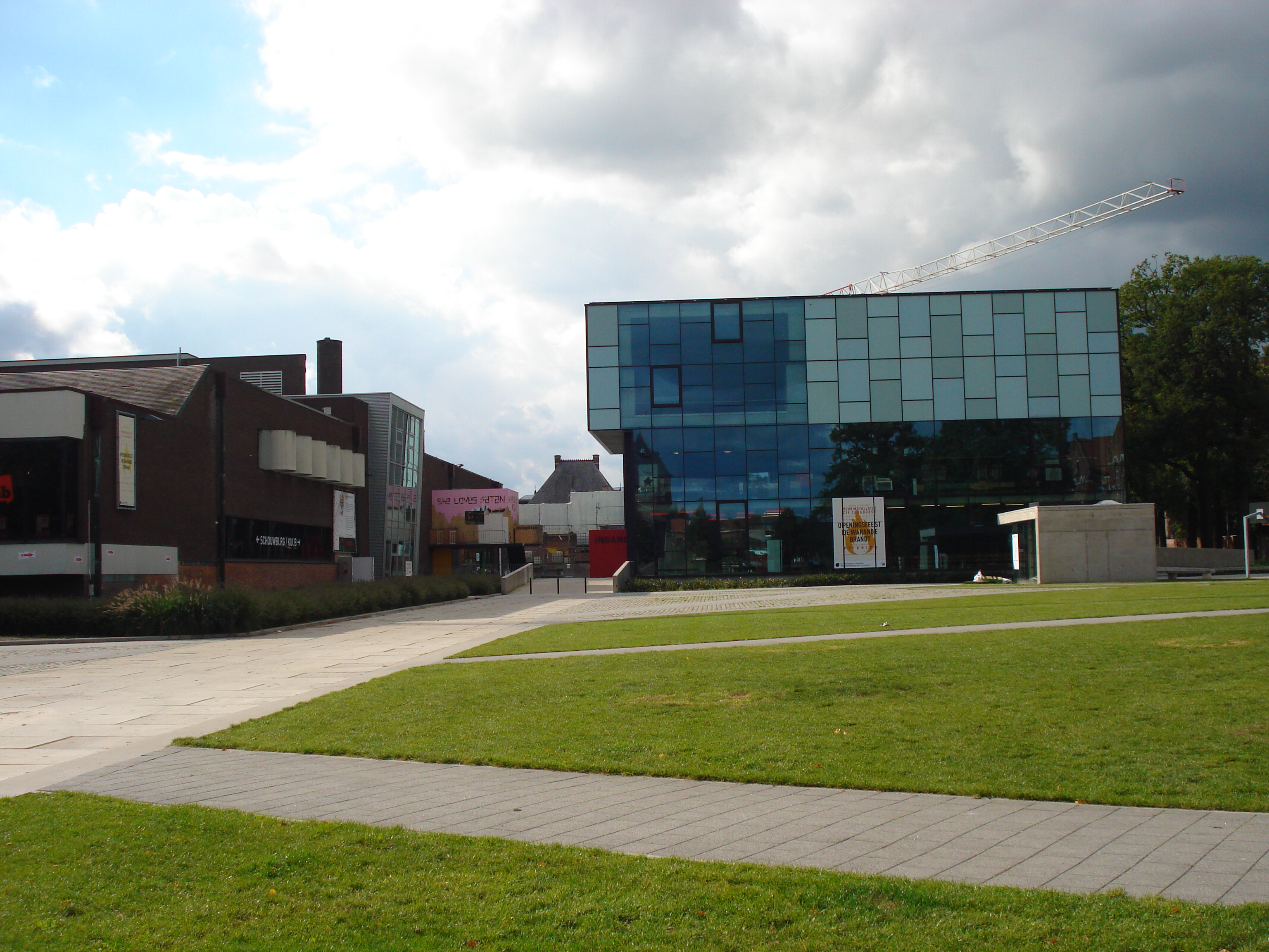 Cultureel Centrum De Warande te Turnhout. Nieuwbouw + plein